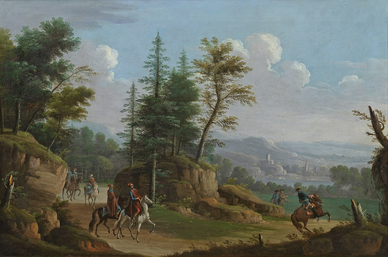 Berglandschaft mit Reitern und Jägern. Öl auf Leinwand, 53,5 cm x 82 cm.